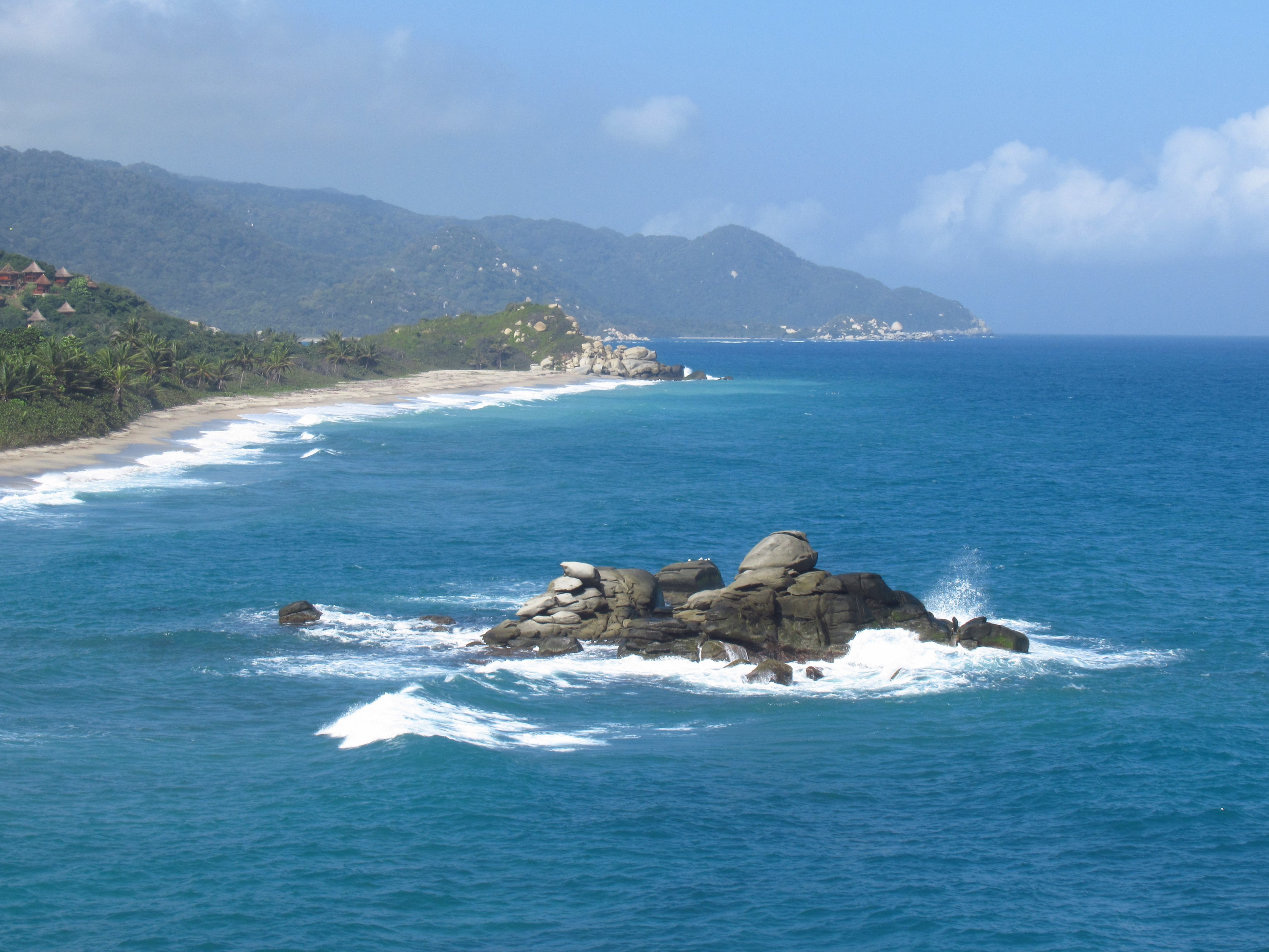 Ensenadas en el Parque nacional natural Tayrona